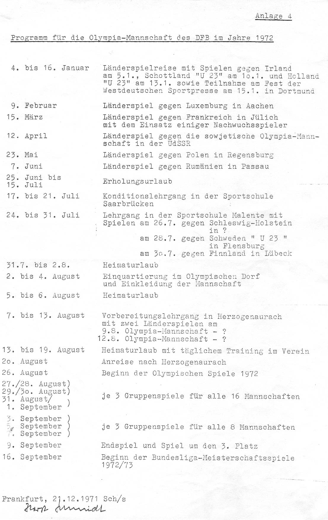 Spielprogramm der Fußball-Olympiamannschaft des DFBs 1972.